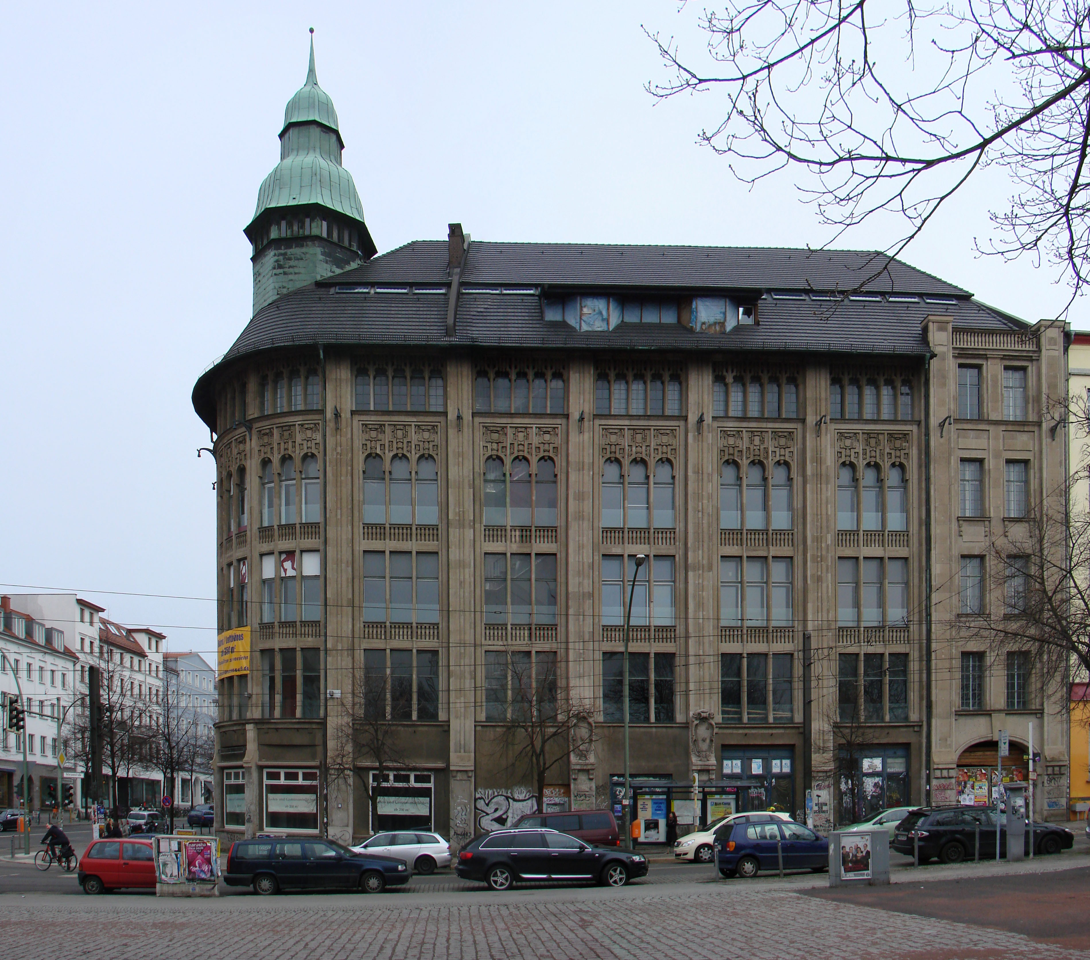 Warenhaus Jandorf (Warenhaus am Weinberg) in Berlin. Aufgenommen 2010